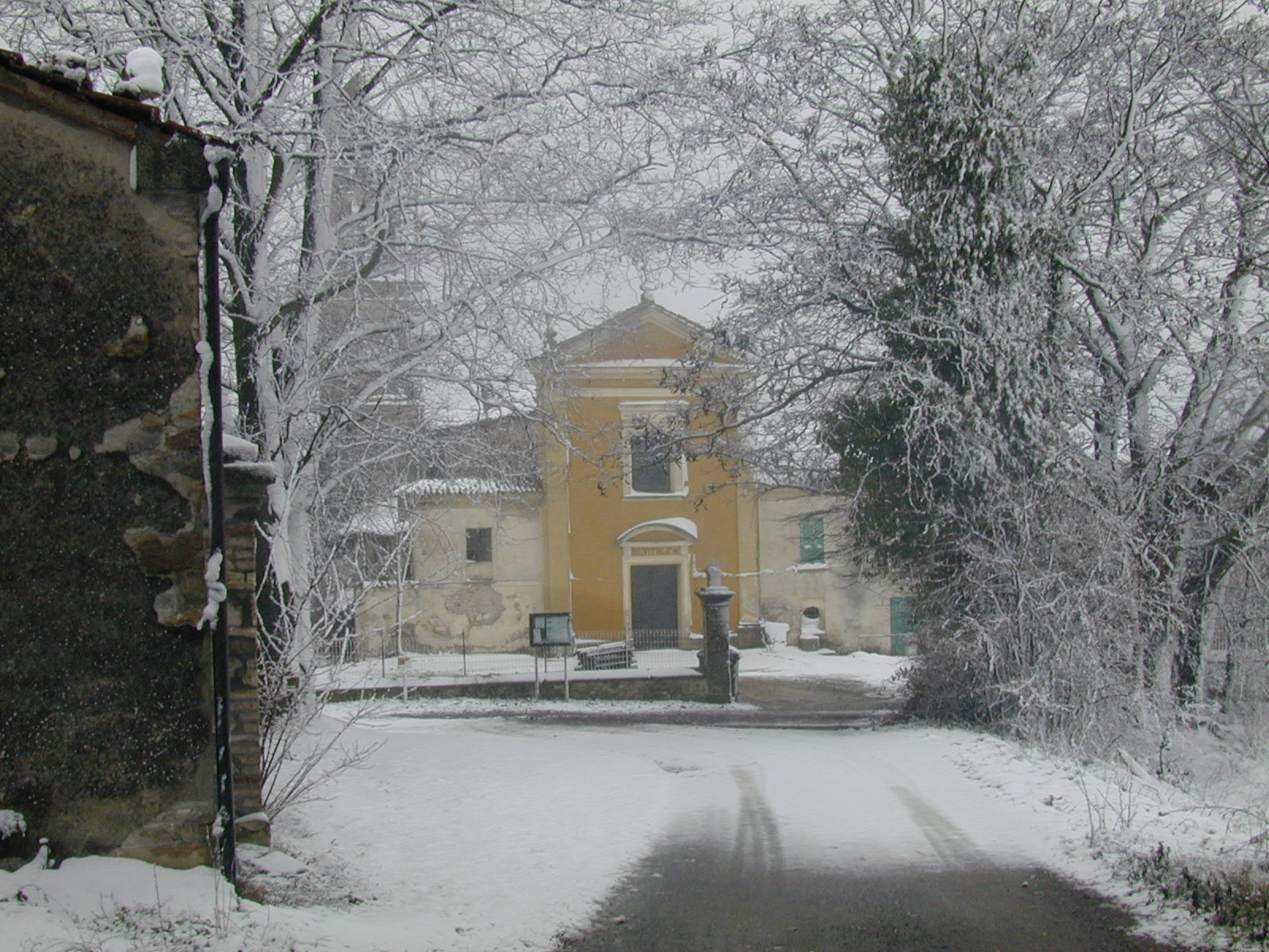 Foto mia personale, pieve di San Vitale Martire, Pomaro, provincia di Piacenza.